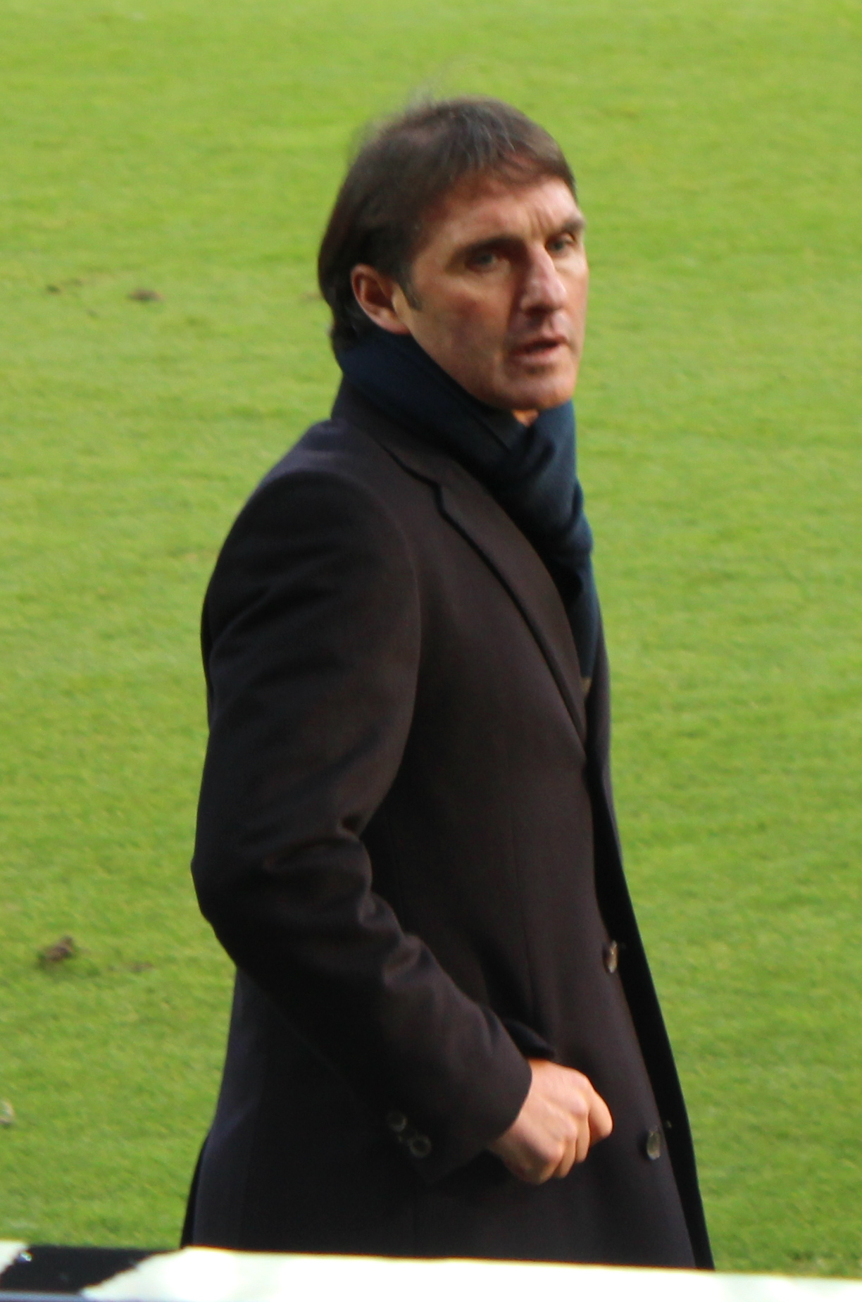 Bruno Labbadia beim Spiel Mainz vs. Stuttgart am 15.12.2012